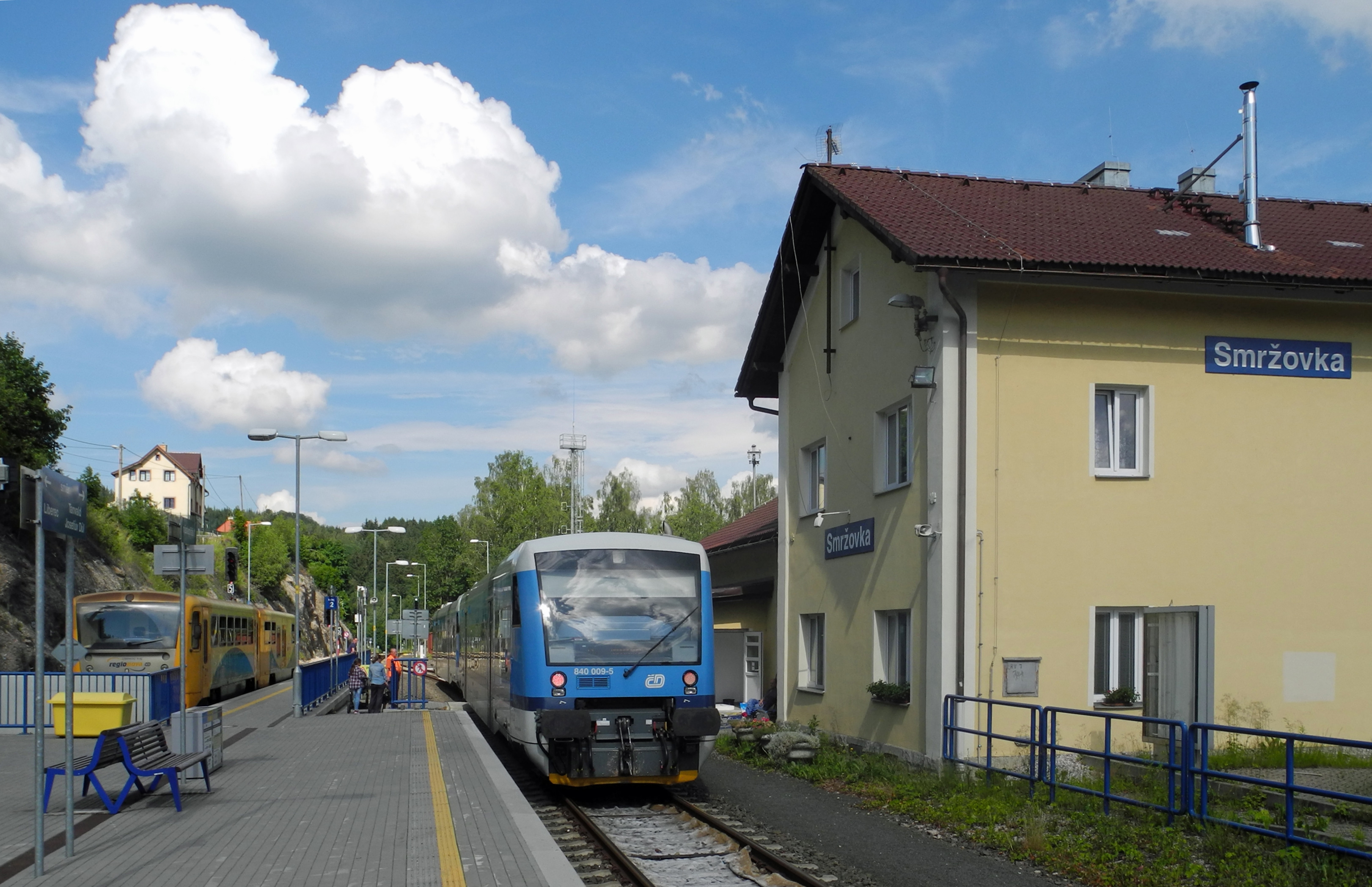 Begegnung der Triebwagenzüge mit der Anschlussbahn nach Josefův Důl (gelb) am Bahnhof Smržovka (Morchenstern) an der Bahnstrecke Tanvald – Harrachov (Tannwald – Harrachsdorf)